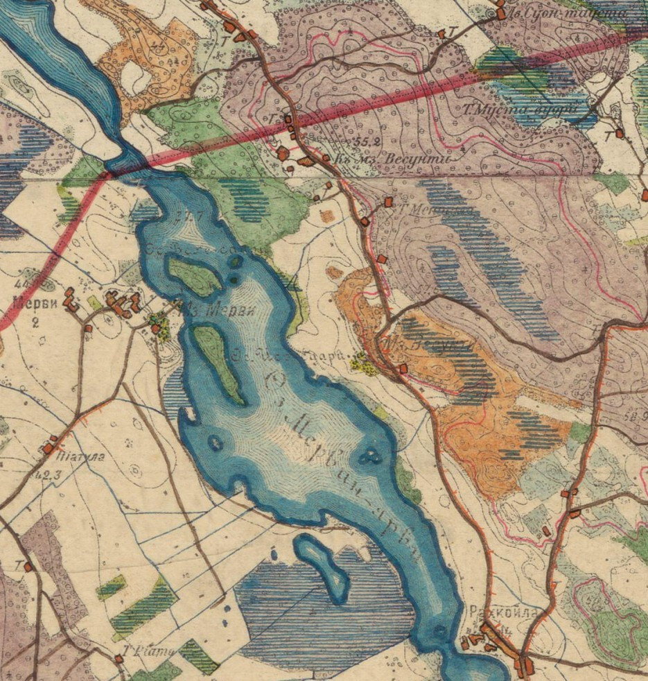 Vesunnin ja Merven kartanot Vanajaveden Mervinselän rannoilla. – Osa venäläistä topografikarttaa vuodelta 1899